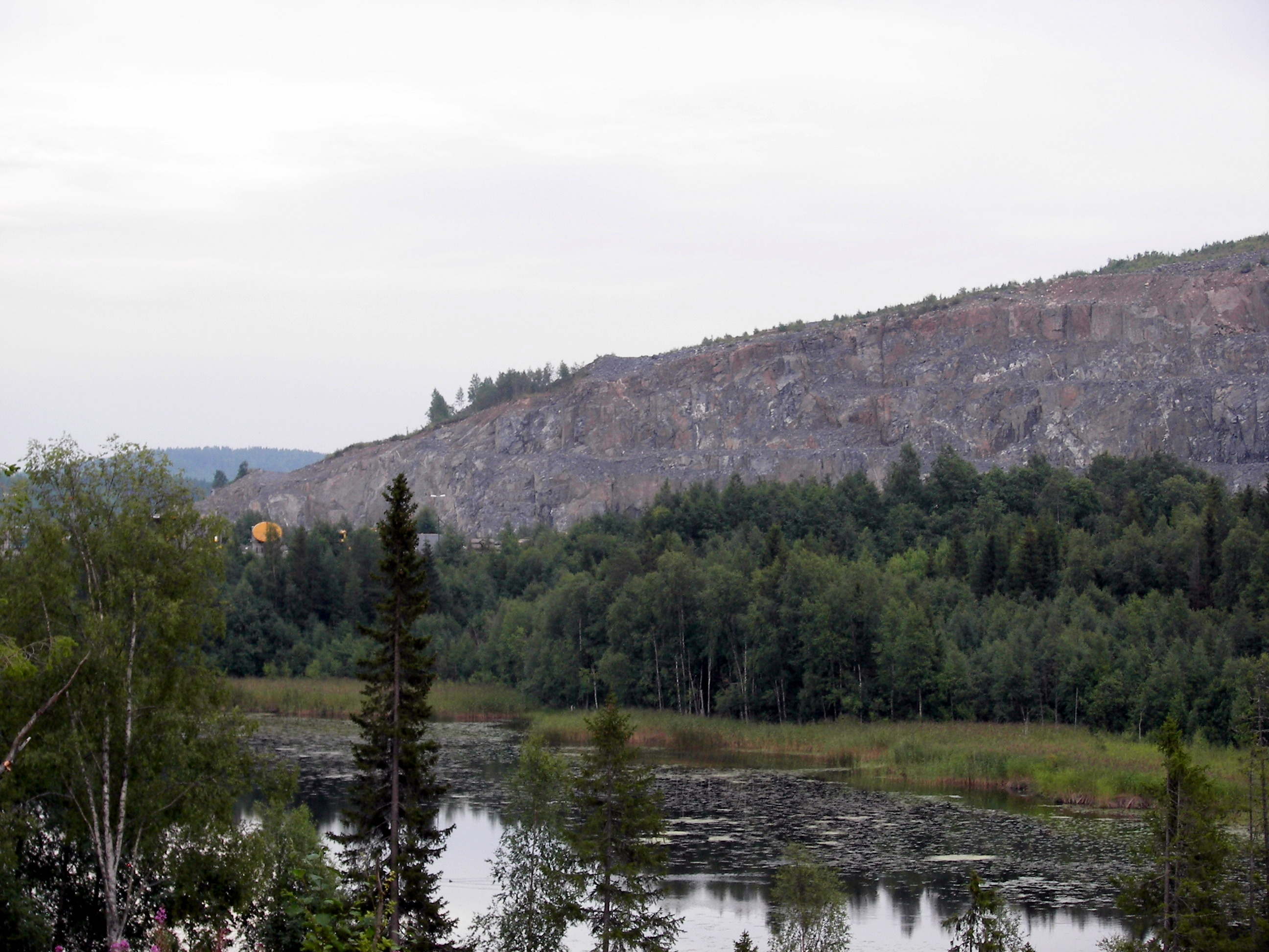 Mörttjärnen med Björkdalsgruvan i bakgrunden.